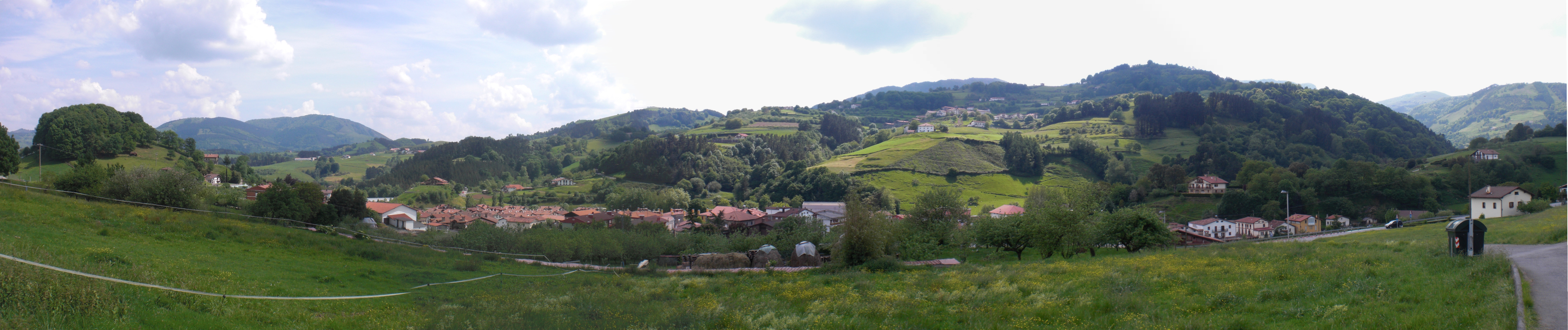 Asteasuko herrigunea Elizmenditik.